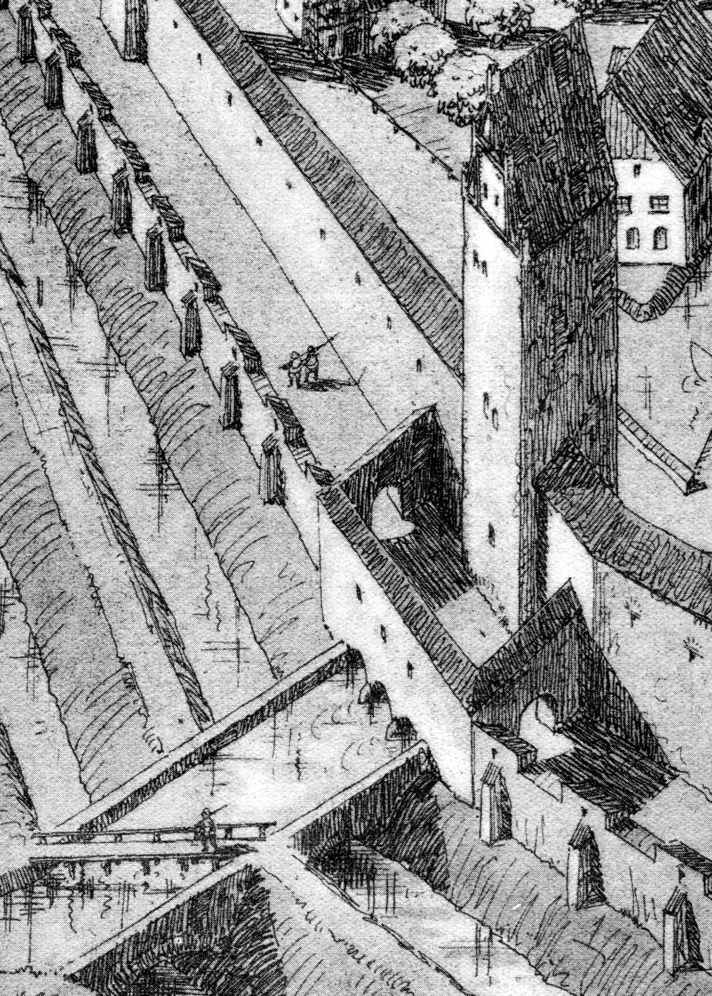 Die Memminger Wasserkunst vor ihrem Abbruch